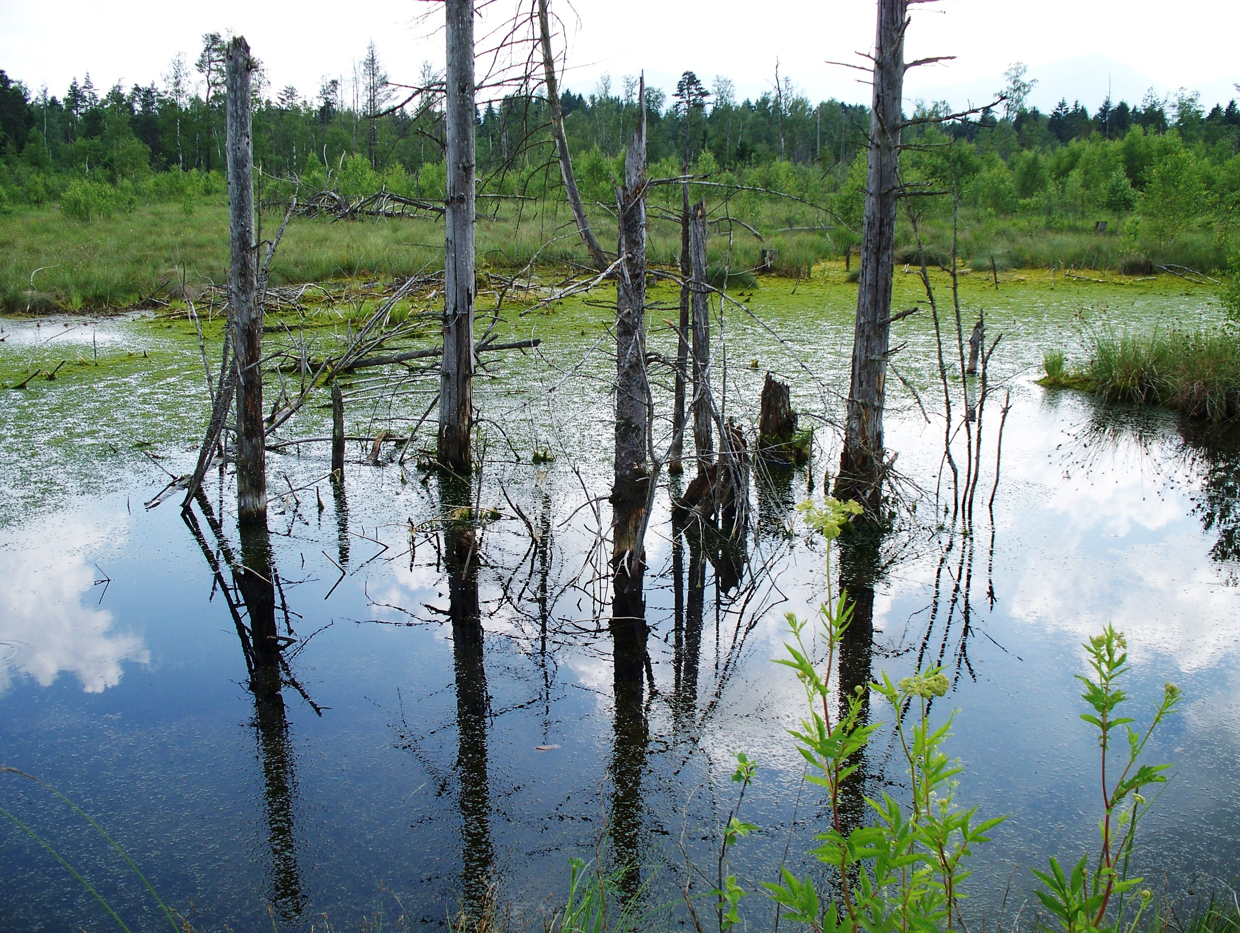 Das Werdensteiner Moos bei Immenstadt.